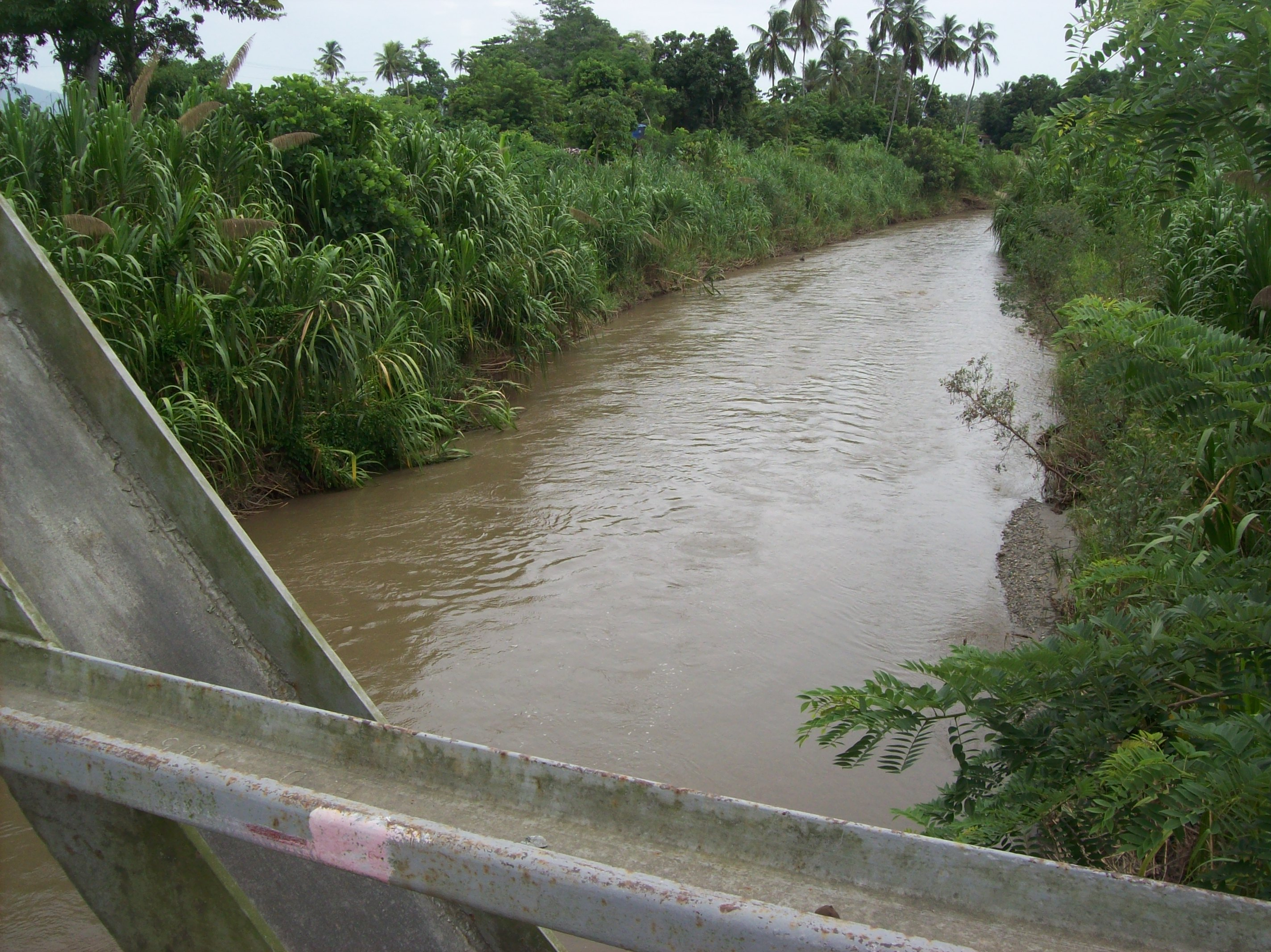 Río Yaracuy a la altura de la comunidad de El Chino